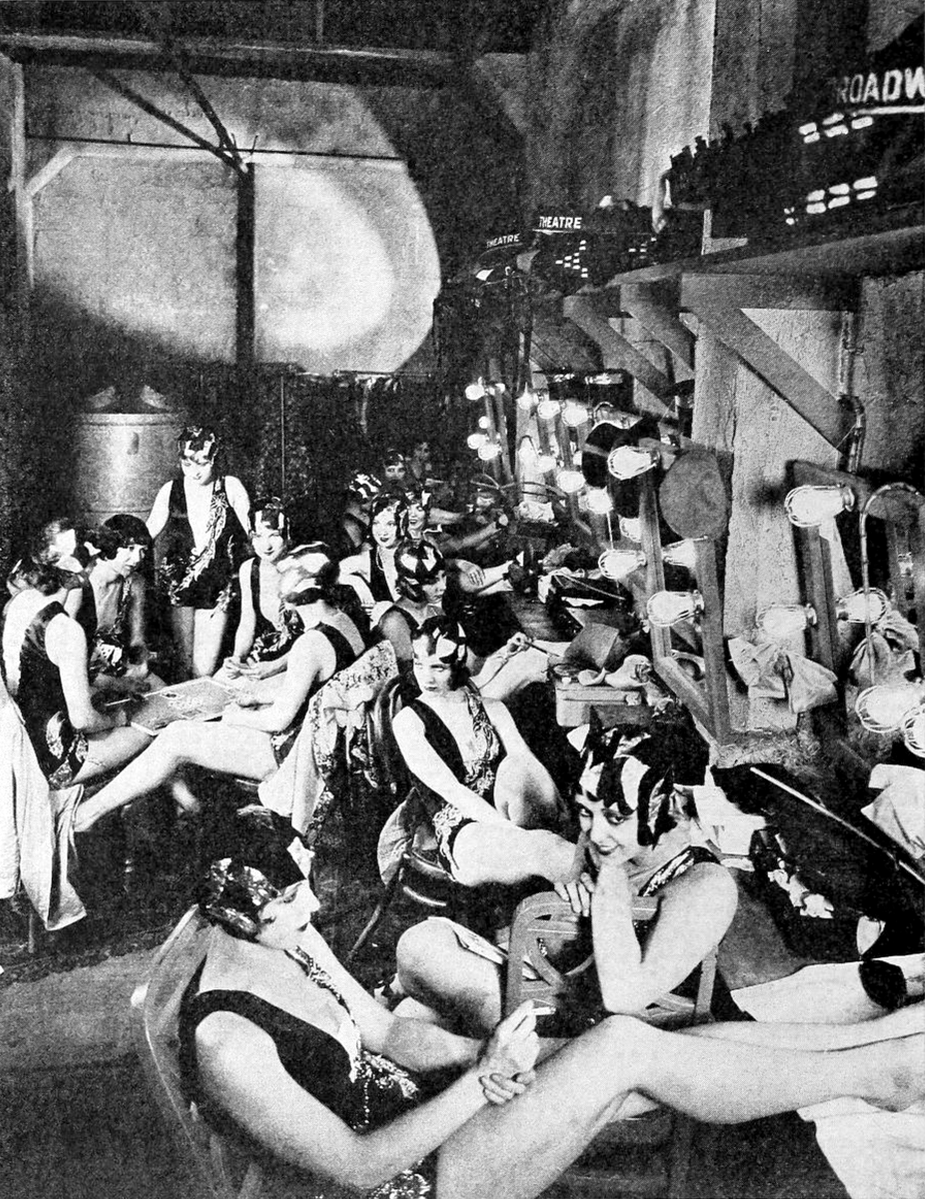 Il camerino del film Broadway. In terzo piano è l'attrice Merna Kennedy